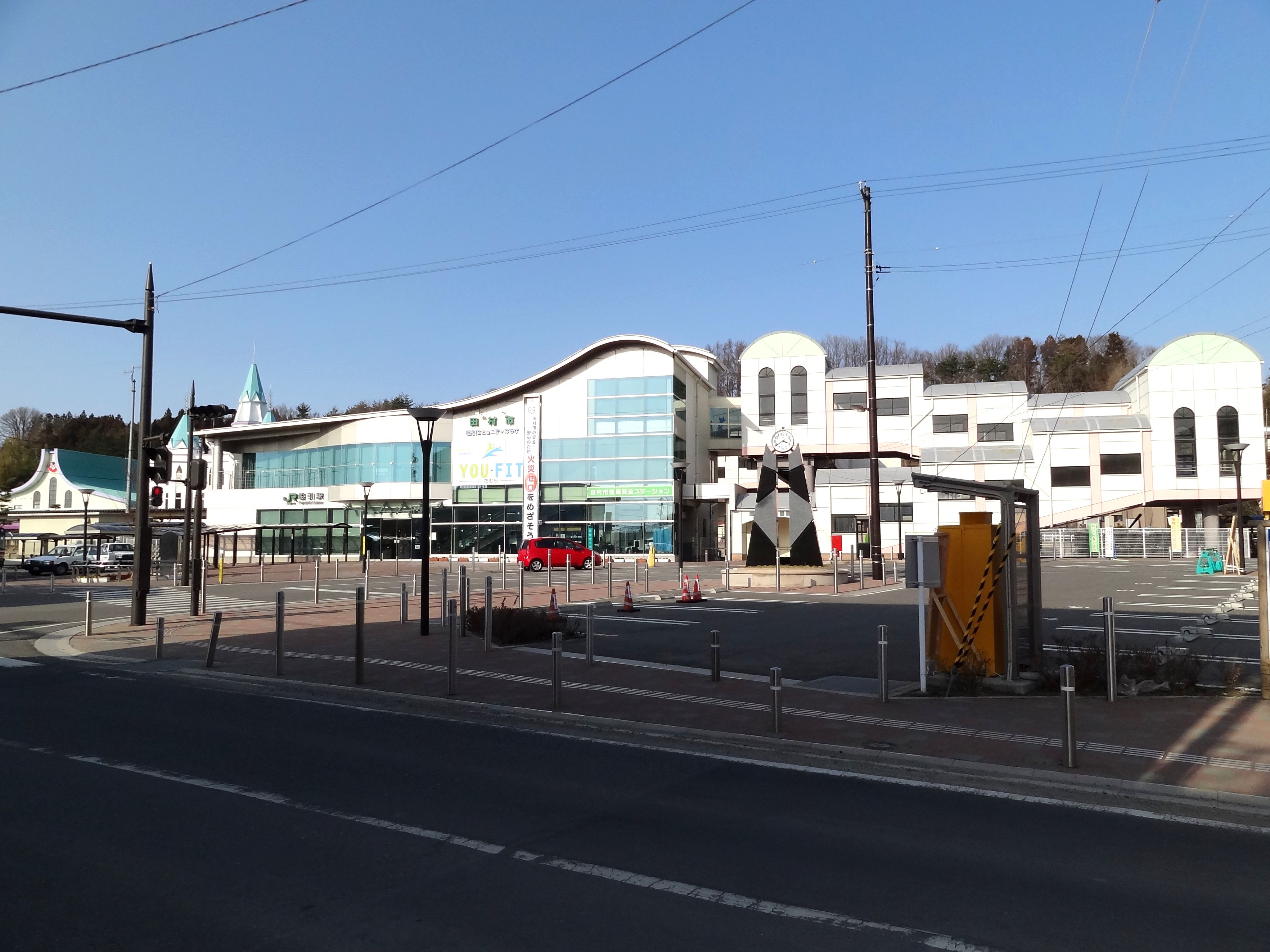 磐越東線 船引駅